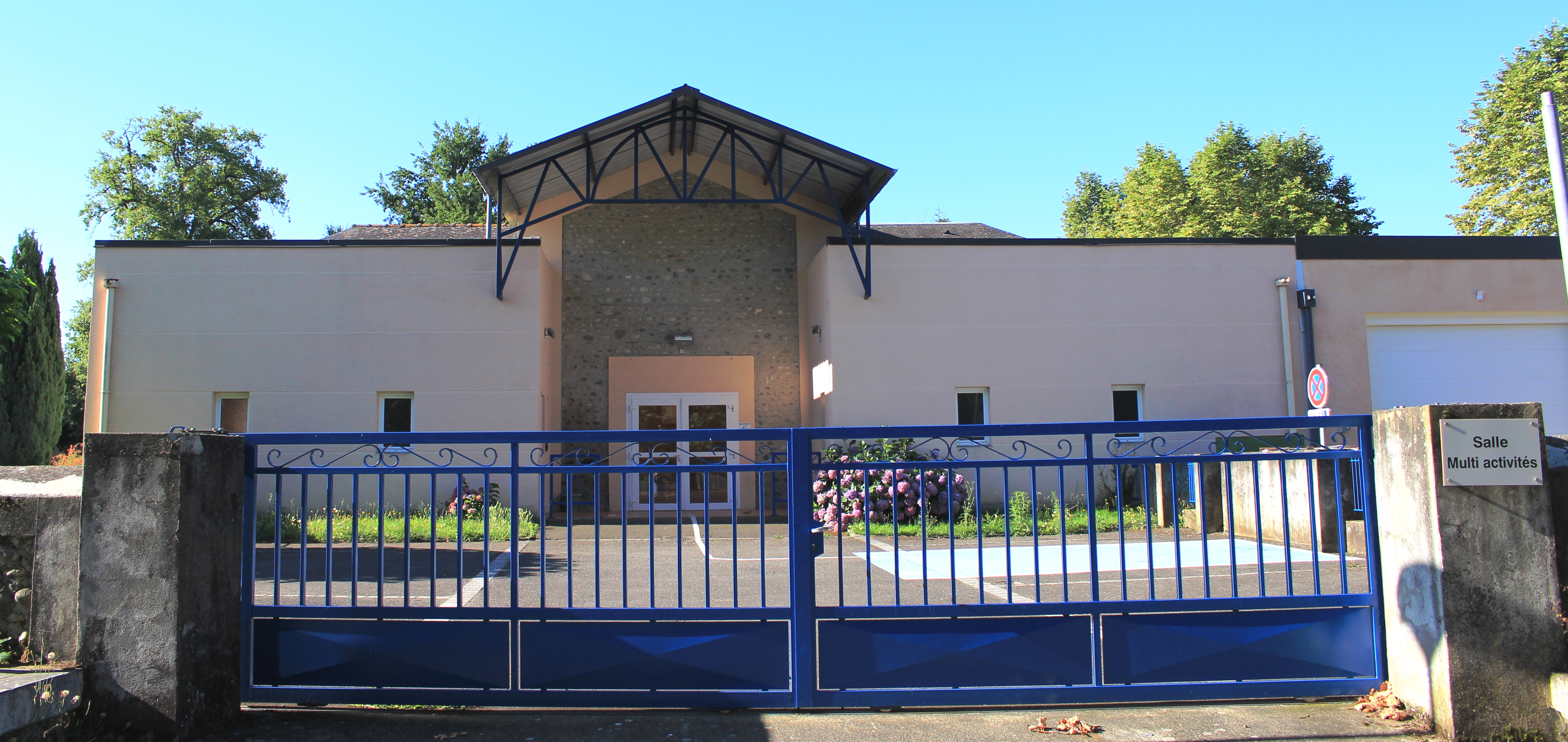 Salle des fêtes de Gayan (Hautes-Pyrénées)